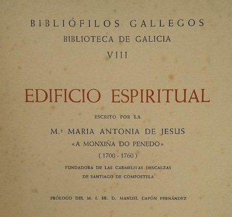 Edificio Espiritual (detail)